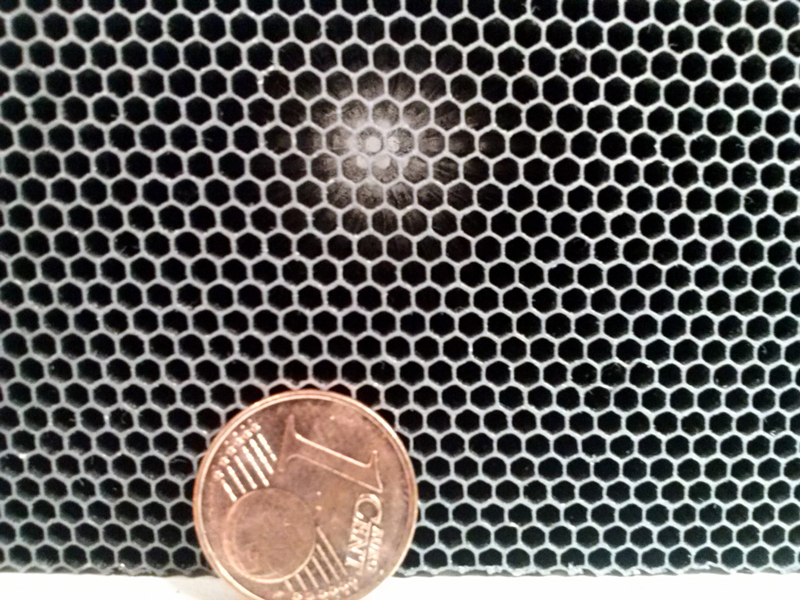 Parallellochkollimator aus Blei mit hexagonalen Löchern. Zum Größenvergleich eine Eurocentmünze.